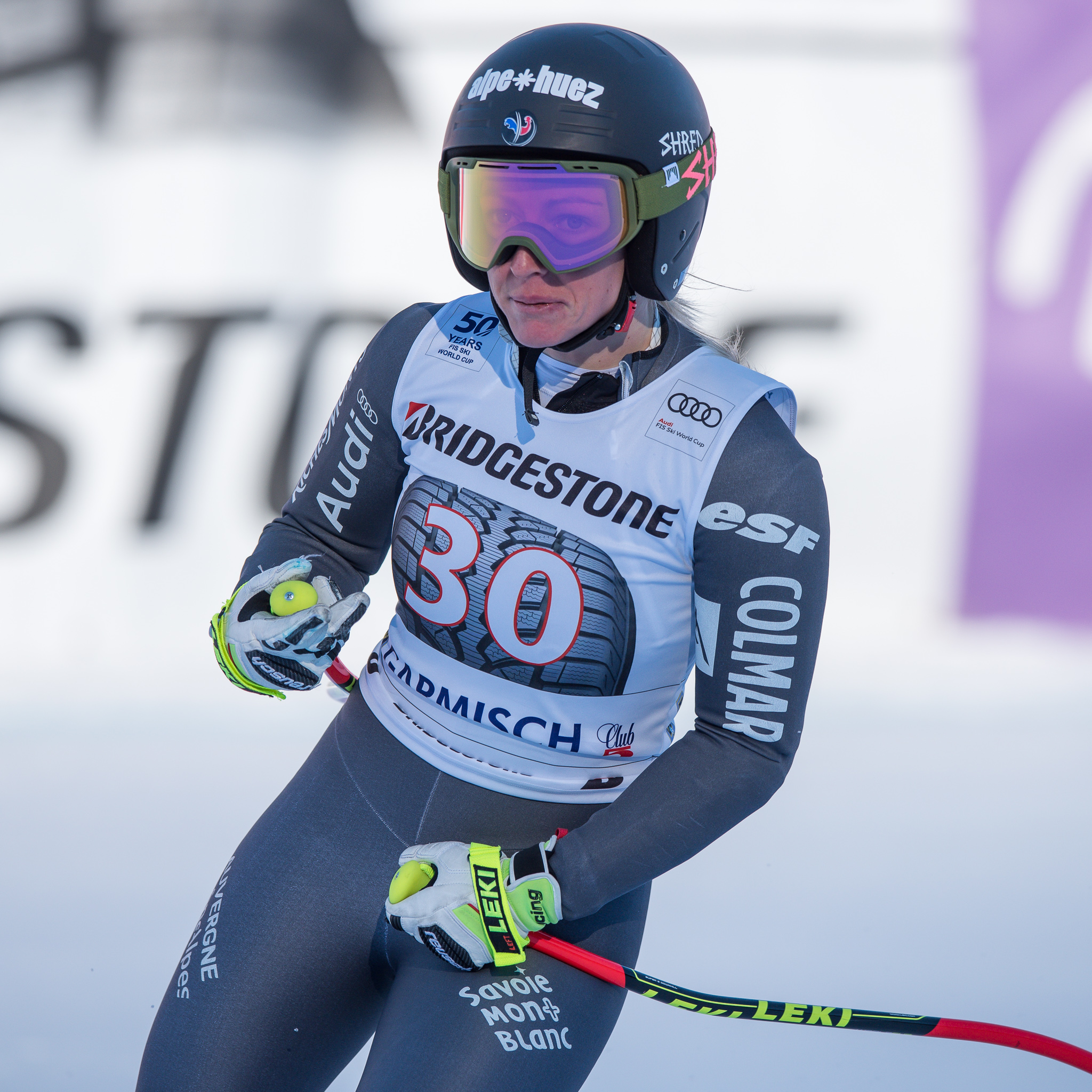 64. Kandahar Rennen,Audi FIS Ski Weltcup Garmisch-Partenkirchen,Damen Super-G,Jennifer Piot,Kandahar,Ladies Super-G